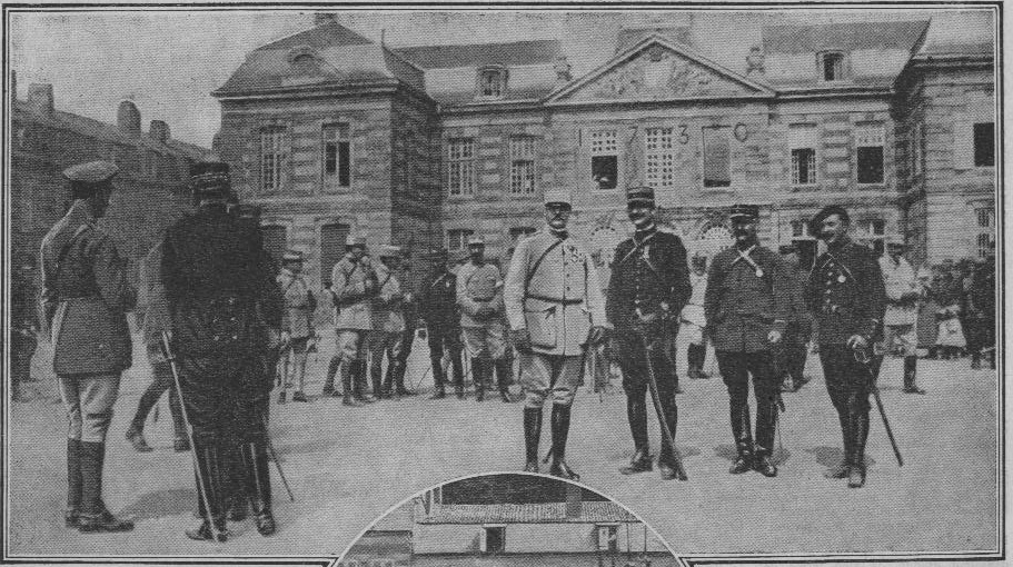 prise d'arme sur la place de St-Menehould en 1914 devant la sous-prefecture et en présence de Sarrail et Connaught pour la remise de décorations. Le Pays de France n°40 page 6.